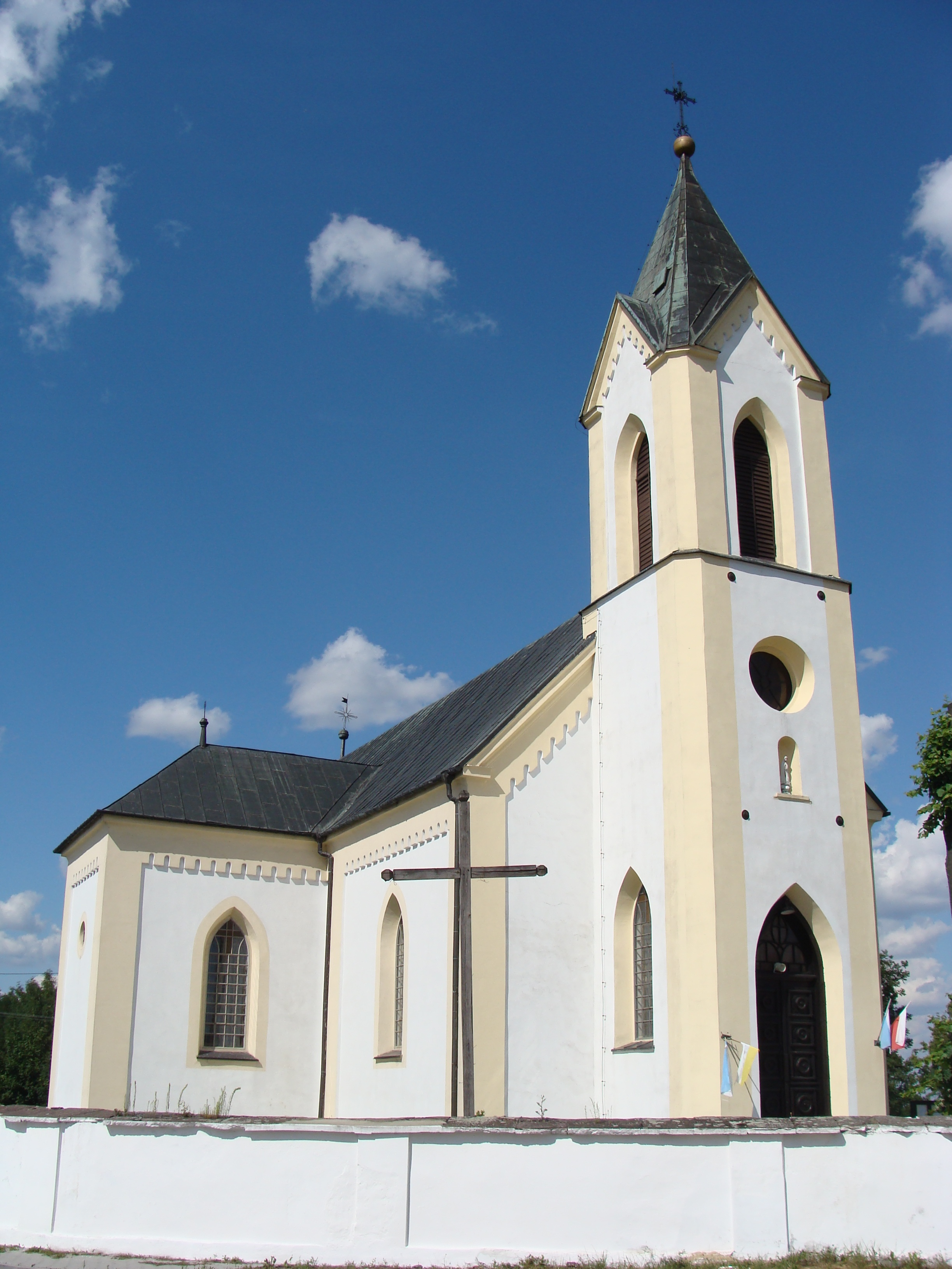 Kościół pw. św. Marii Magdaleny w Rokitnie